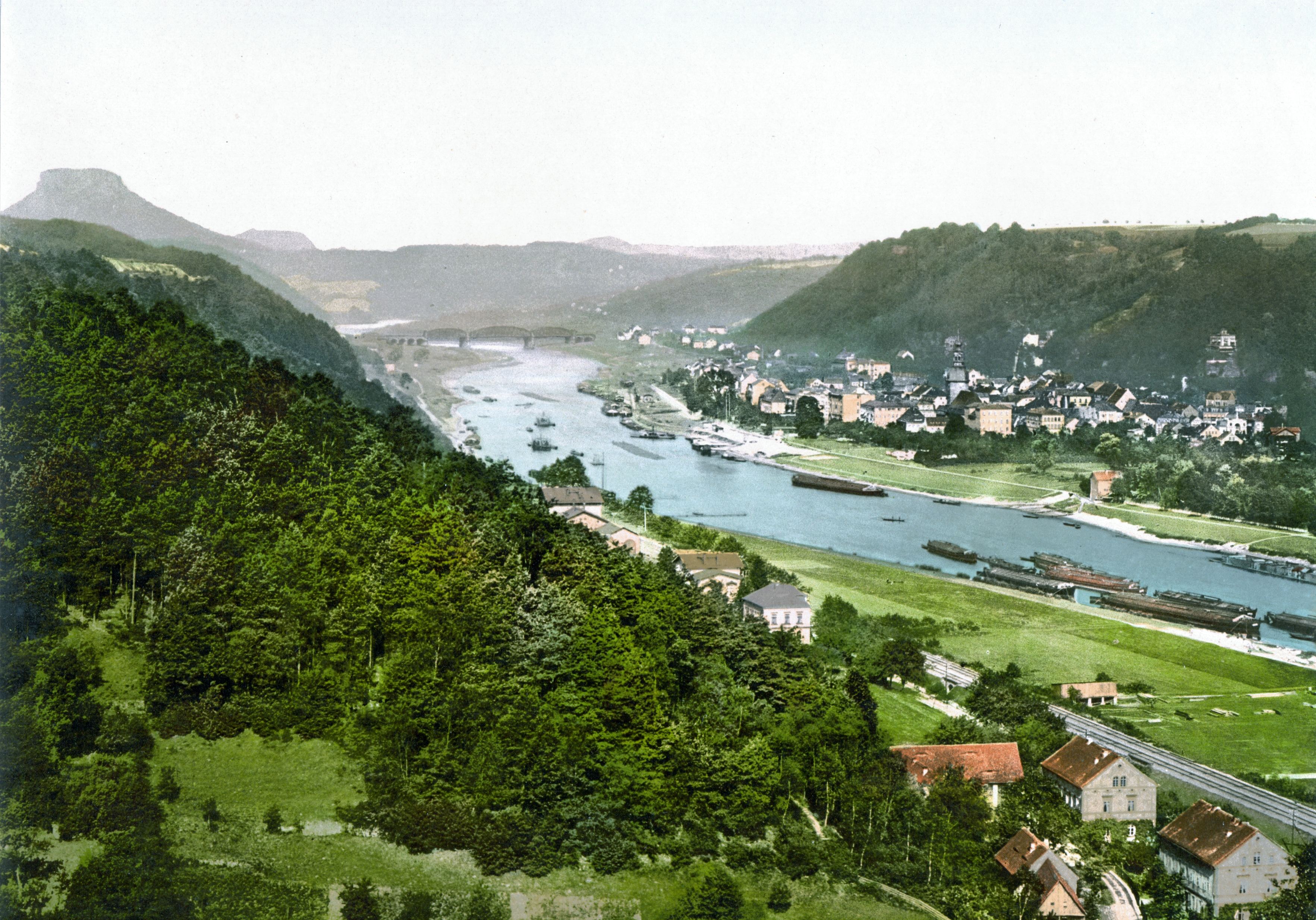 Bad Schandau